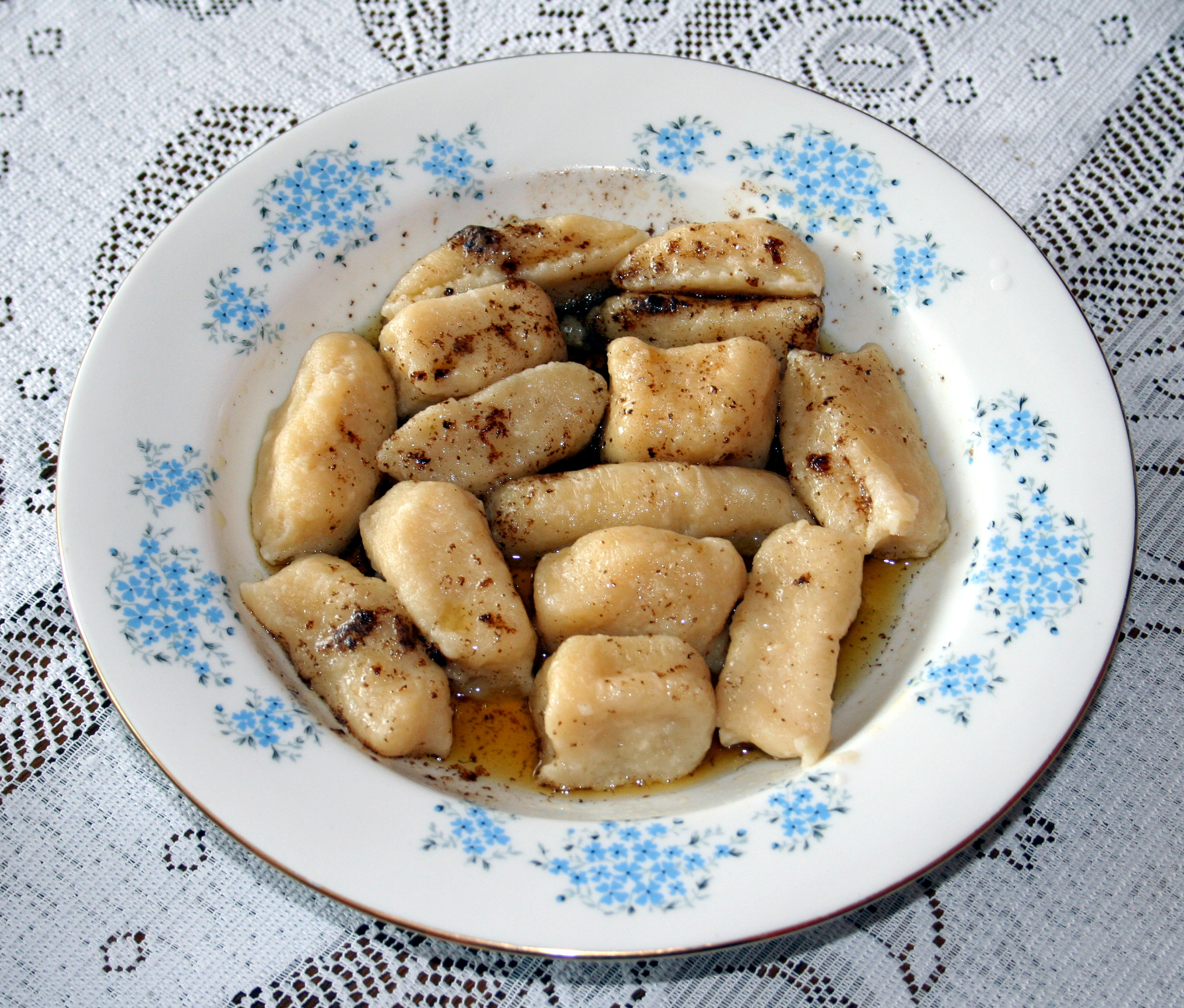 pierogi leniwe z cynamonem